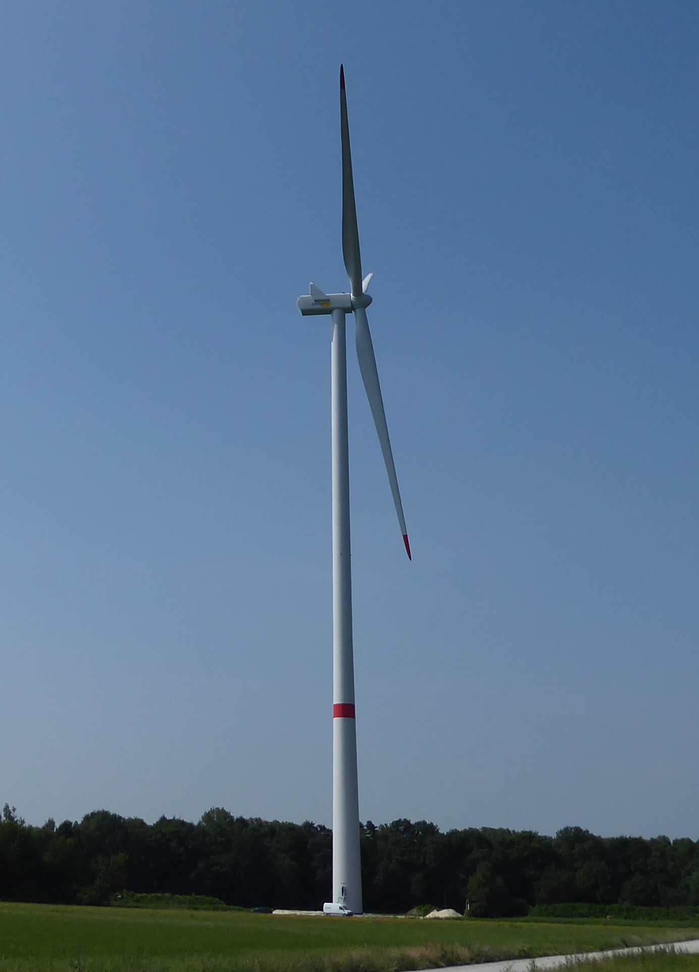 Windenergieanlage Vestas V126 auf 13 7m Nabenhöhe, 126 m Rotordurchmesser und 3,3 MW Nennleistung; Bielefeld